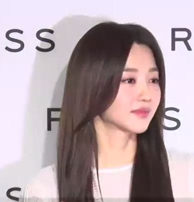 Jang Hee-jin, actriz surcoreana